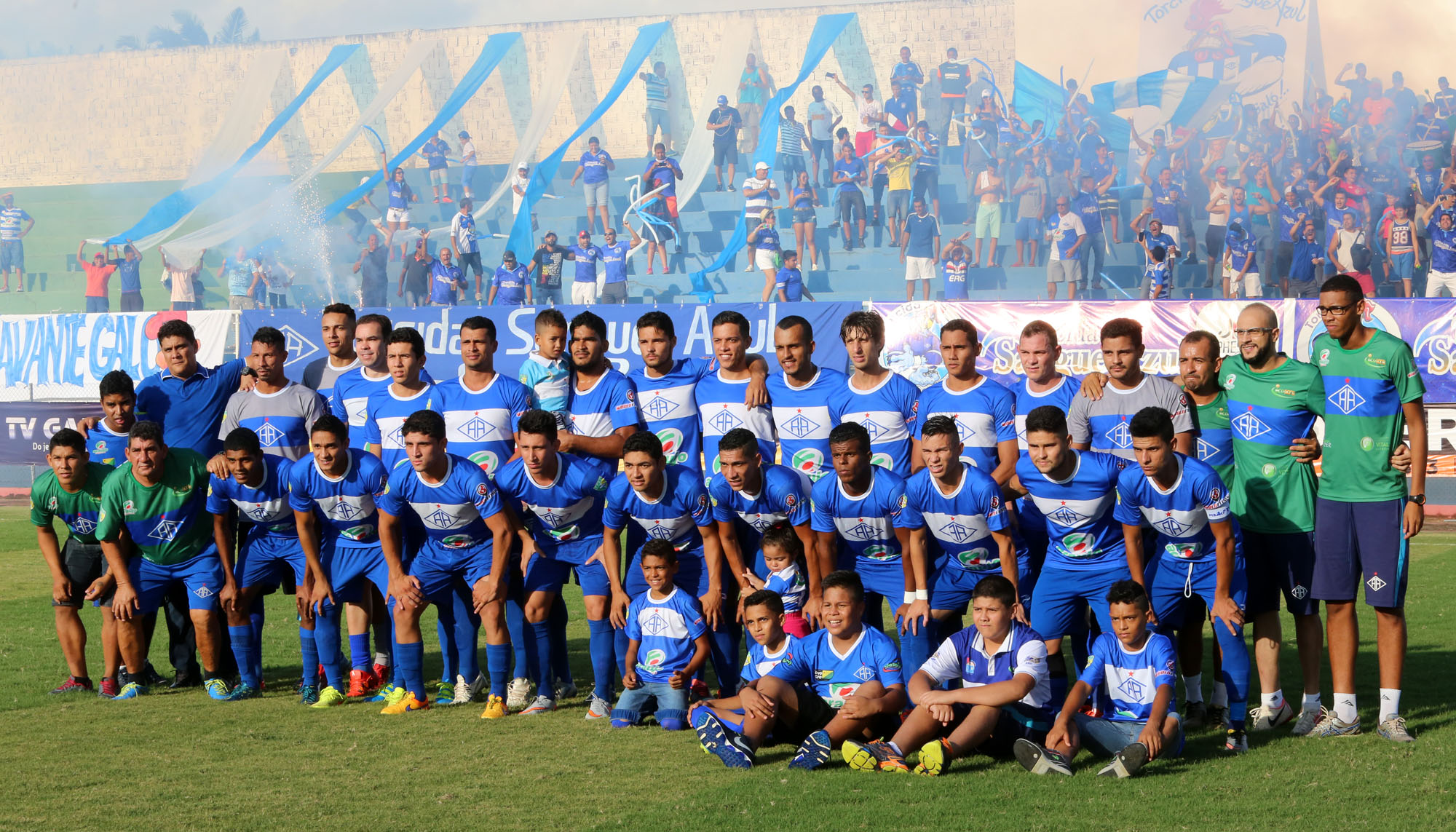 Foto: Sérgio Vale/Secom